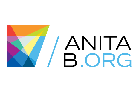 লোগো